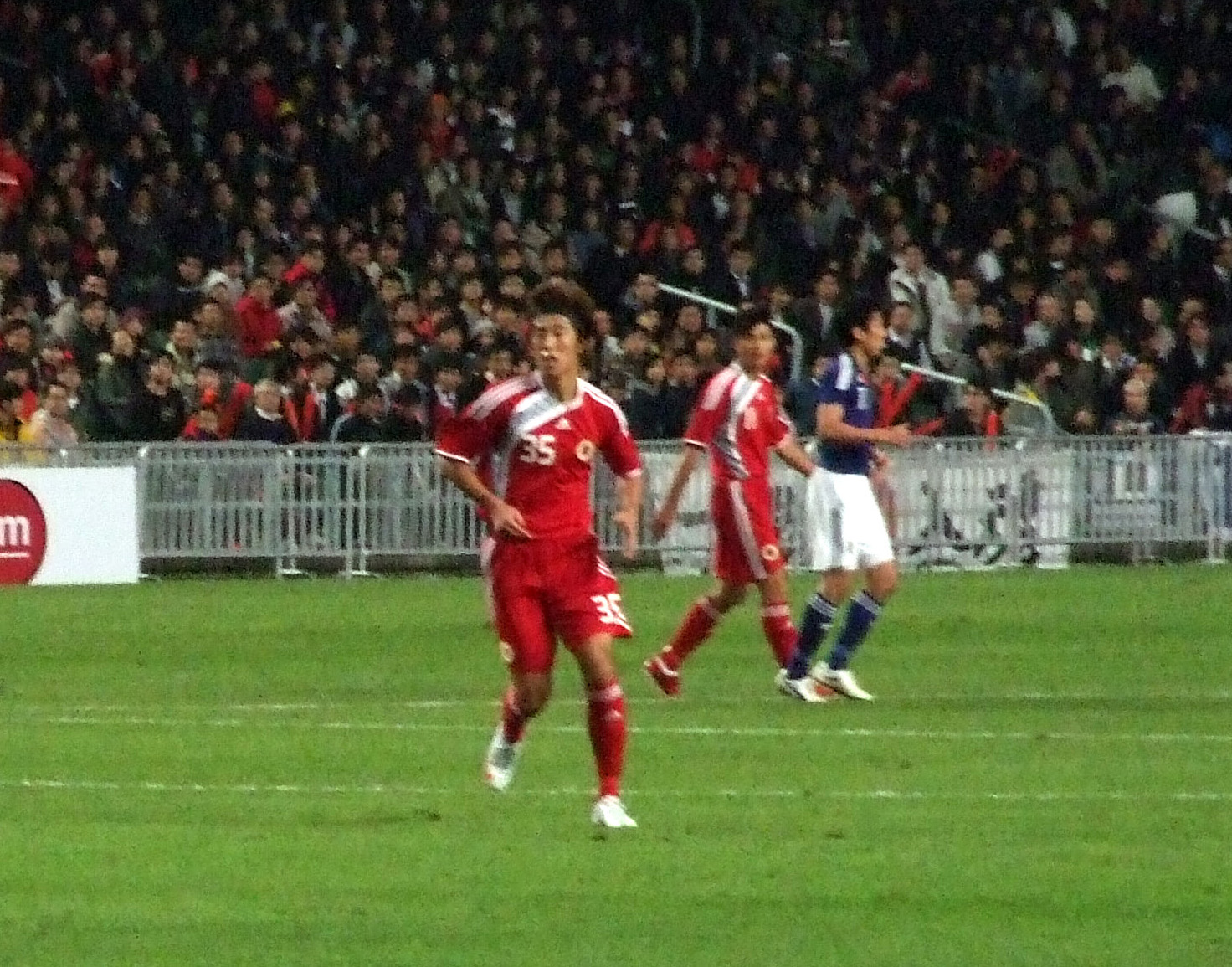 中文（香港）: 白鹤